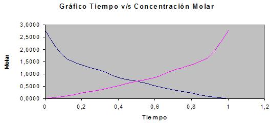 Imágen tipo *.jpeg y equivalentes; imágen de tiempo v/s concentración molar, velocidad de reacción; creada en Microsoft Excel.